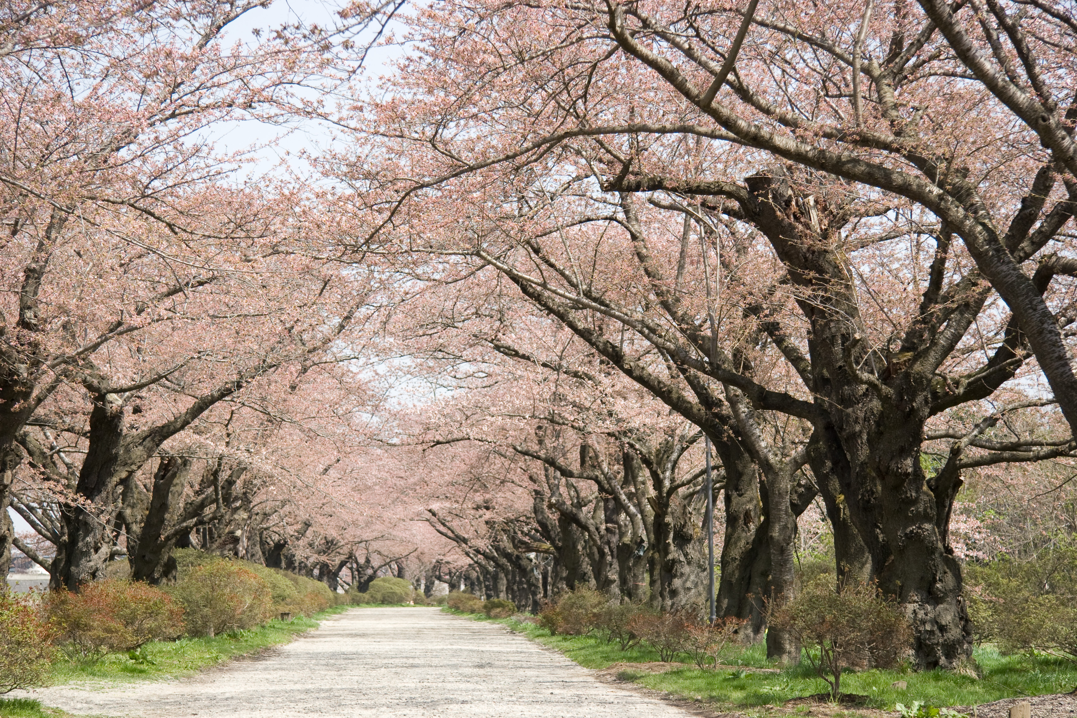 Tenshochi Park in Kitakami, Iwate, Japan